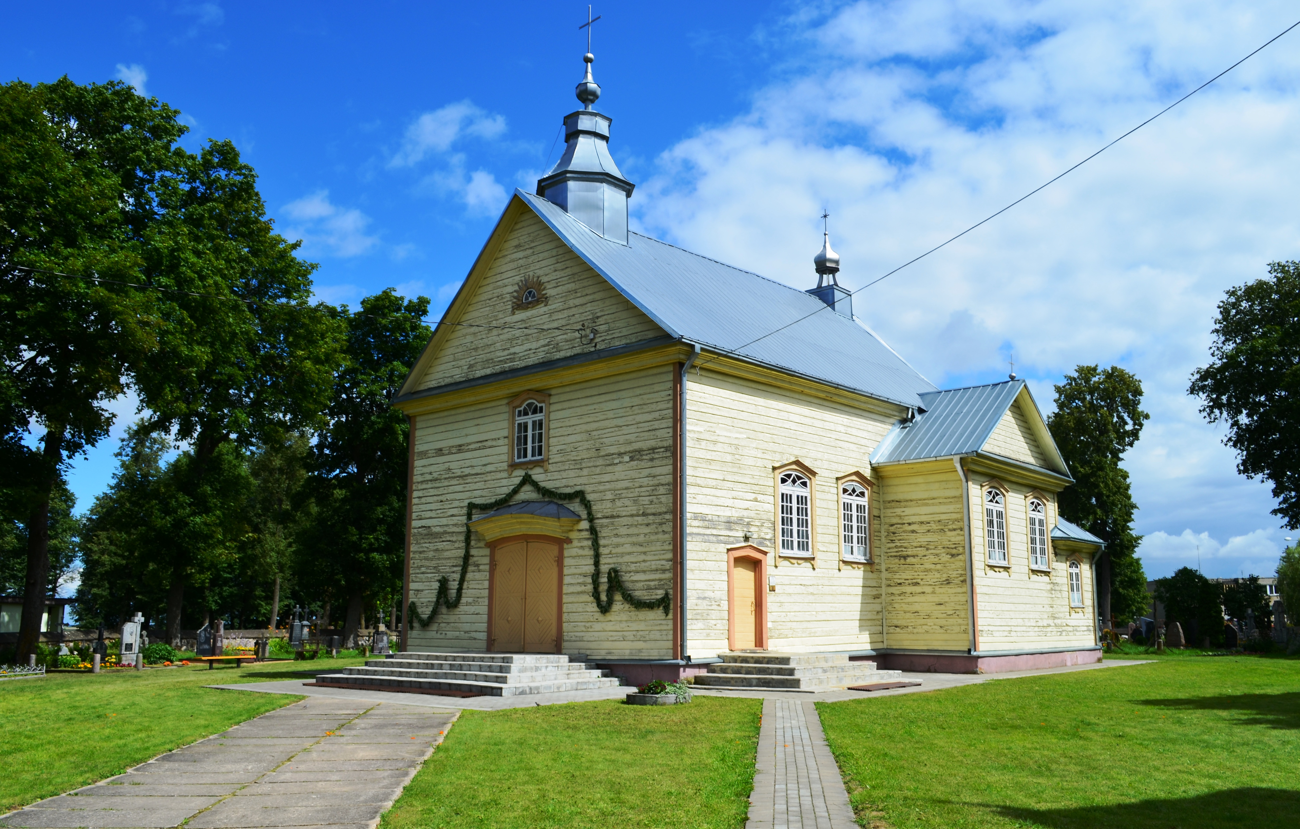 Upytės bažnyčia, Panevėžio raj.